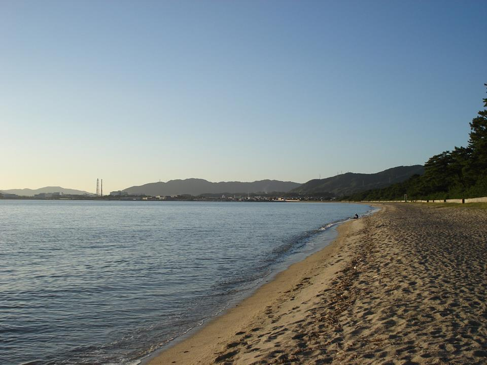 日本の渚百選